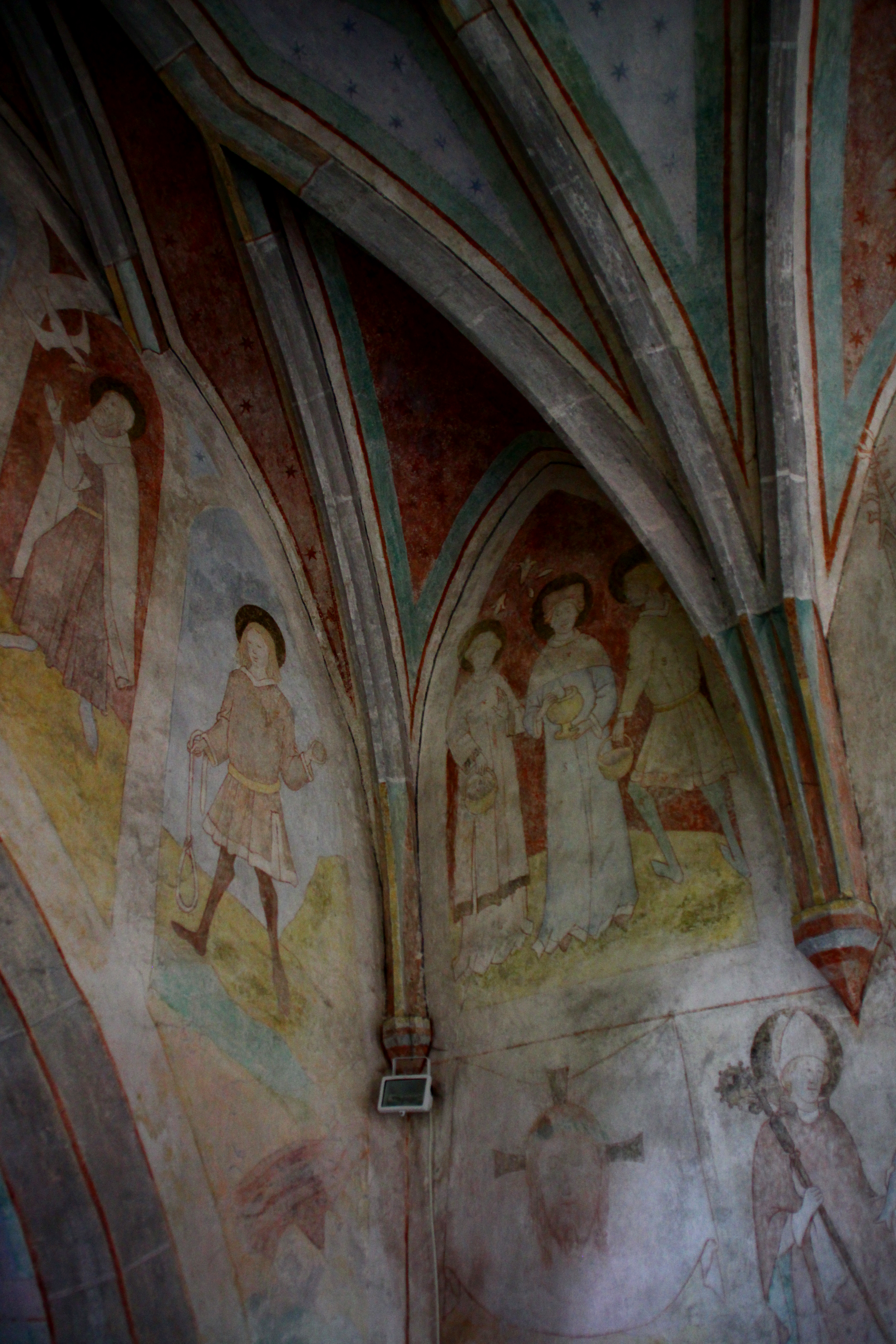 Die Keckkapelle von innen, Wandmalereien